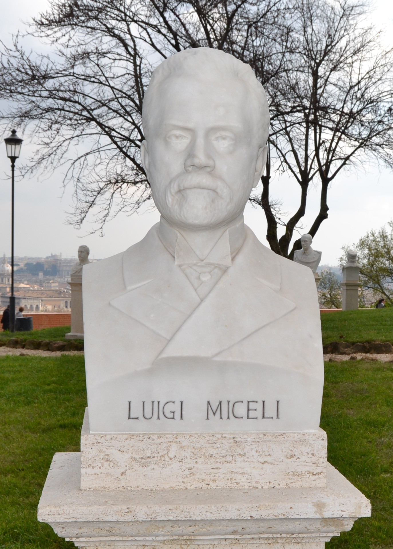 Busto restaurato di Luigi Miceli